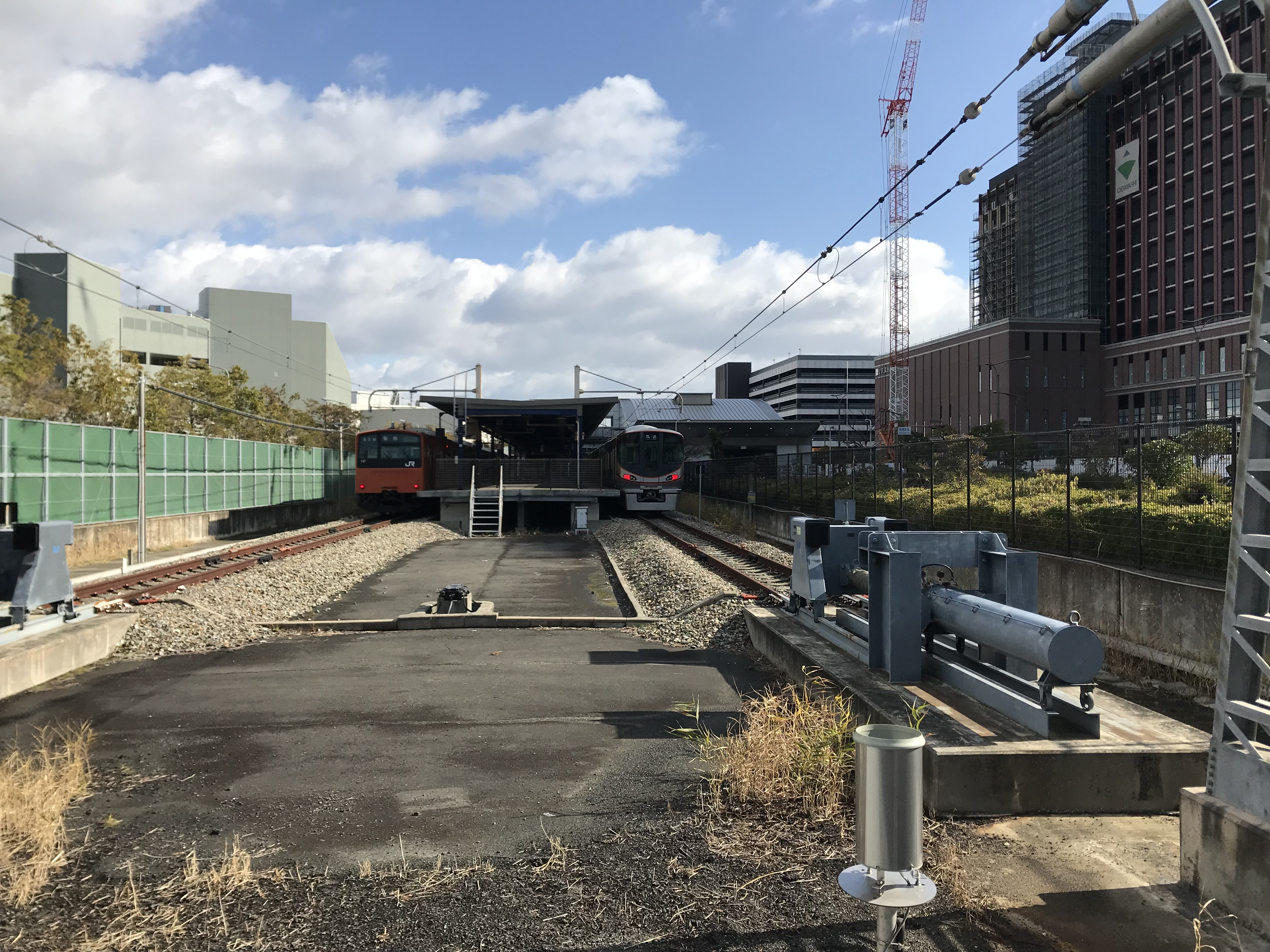 西側より望む桜島駅のホーム